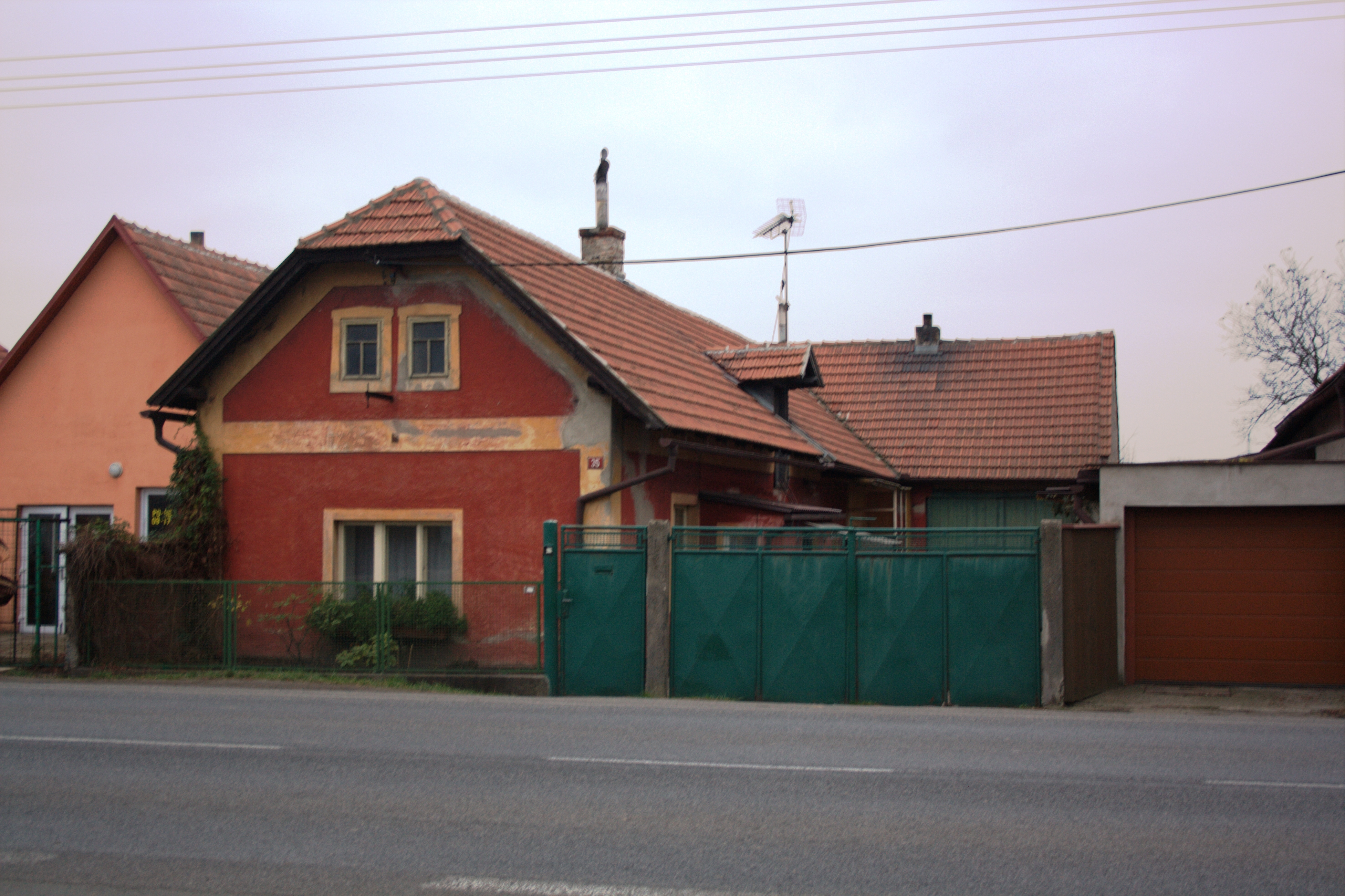 Dům číslo popisné 35 v obci Vavřineč, části Malého Újezda.